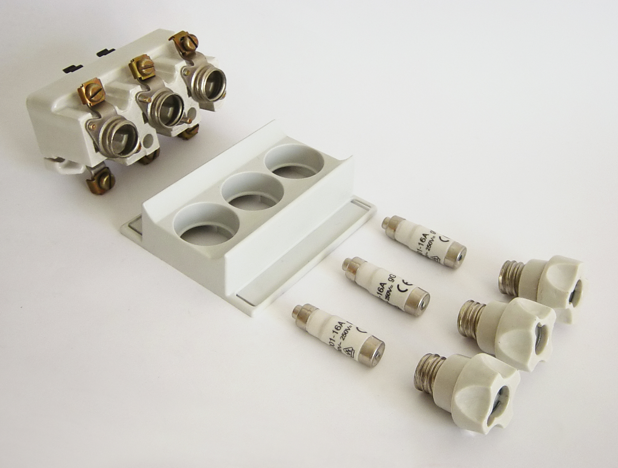 3-poliges Sicherungselement, 3x 16Ampere Neozed Sicherungen, Schraubverschlüsse